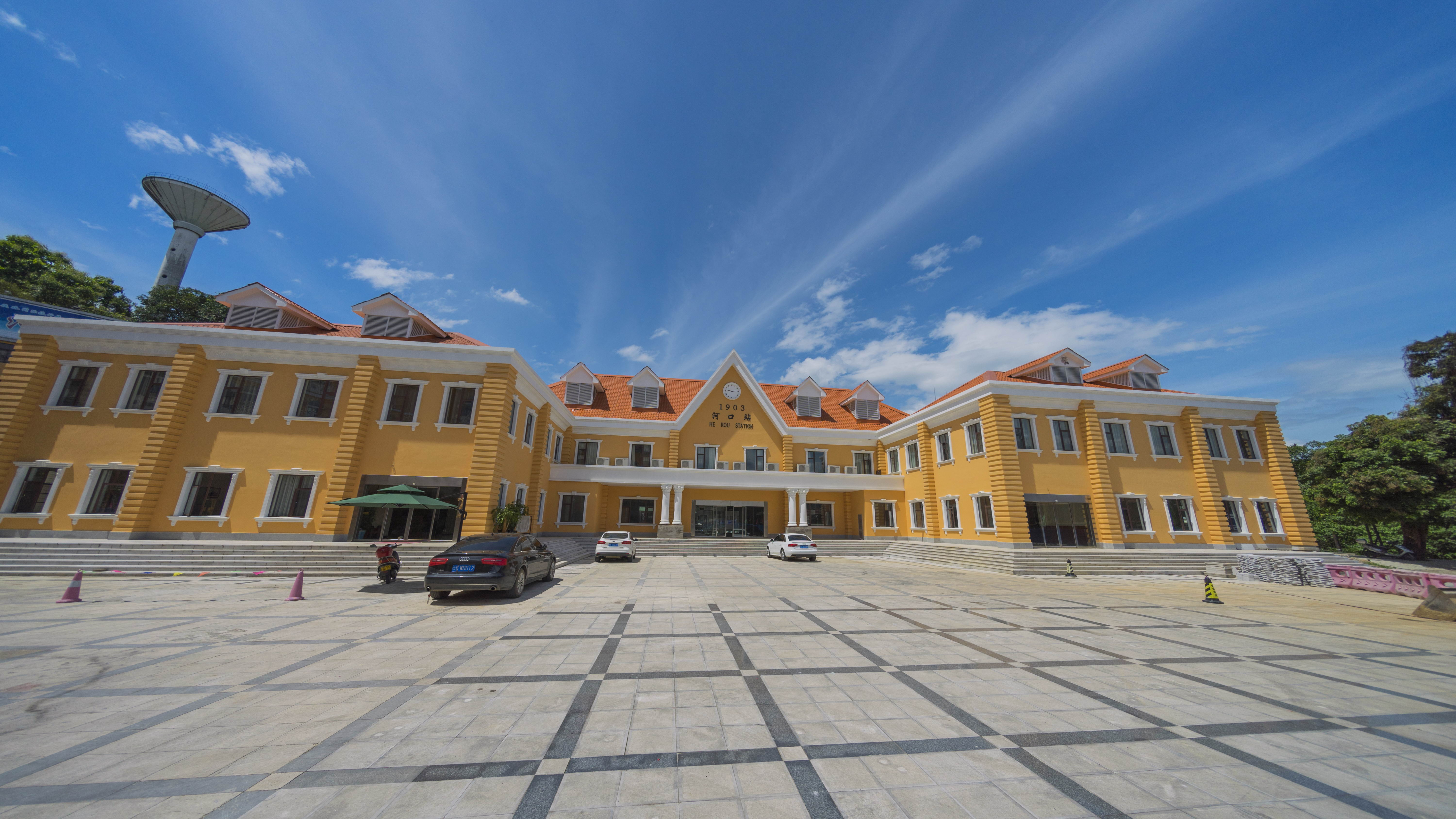 Yunnan, China